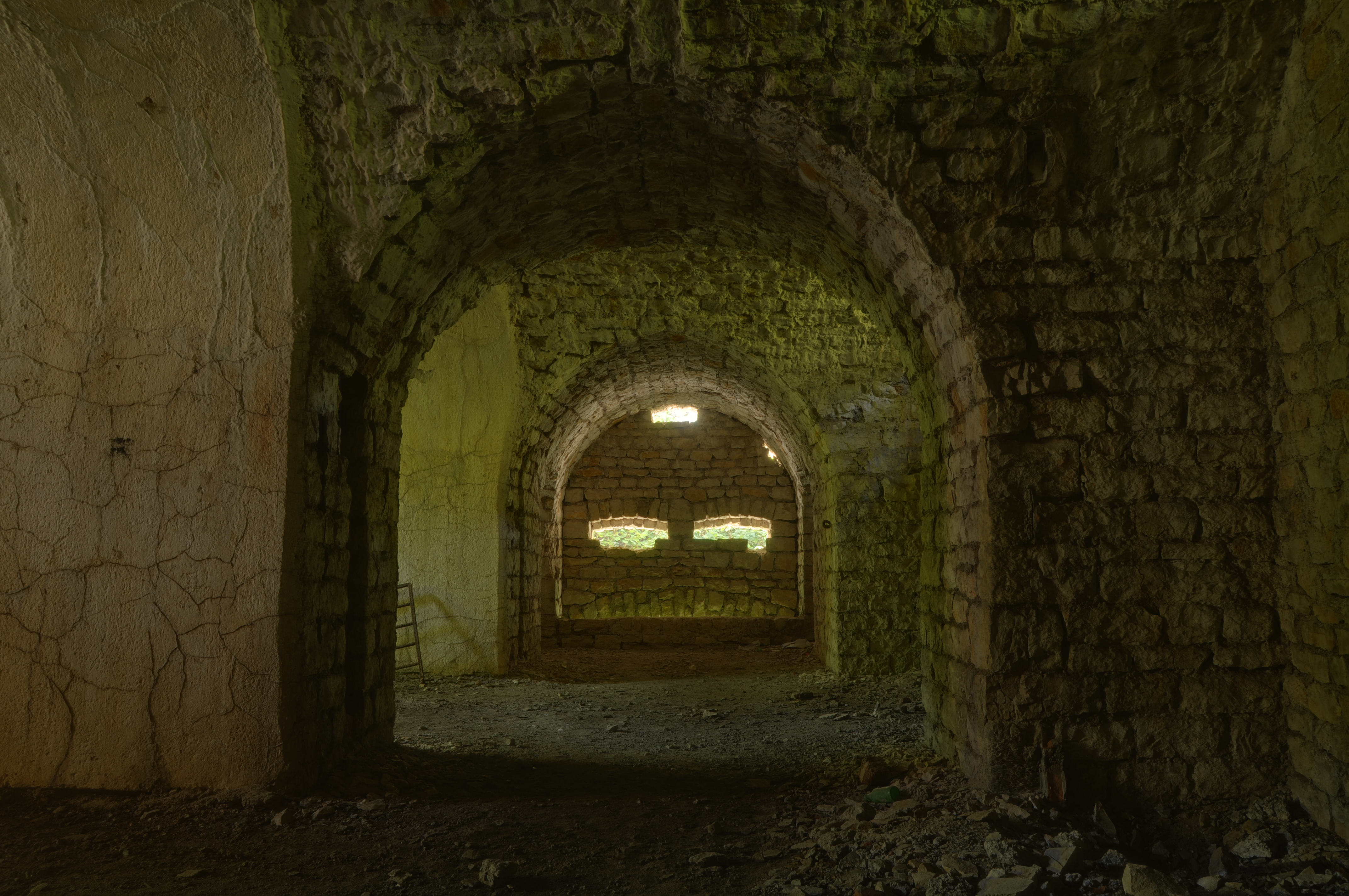 Dans la caponnière simple ouest. Salbert hill fortifications (HDR).